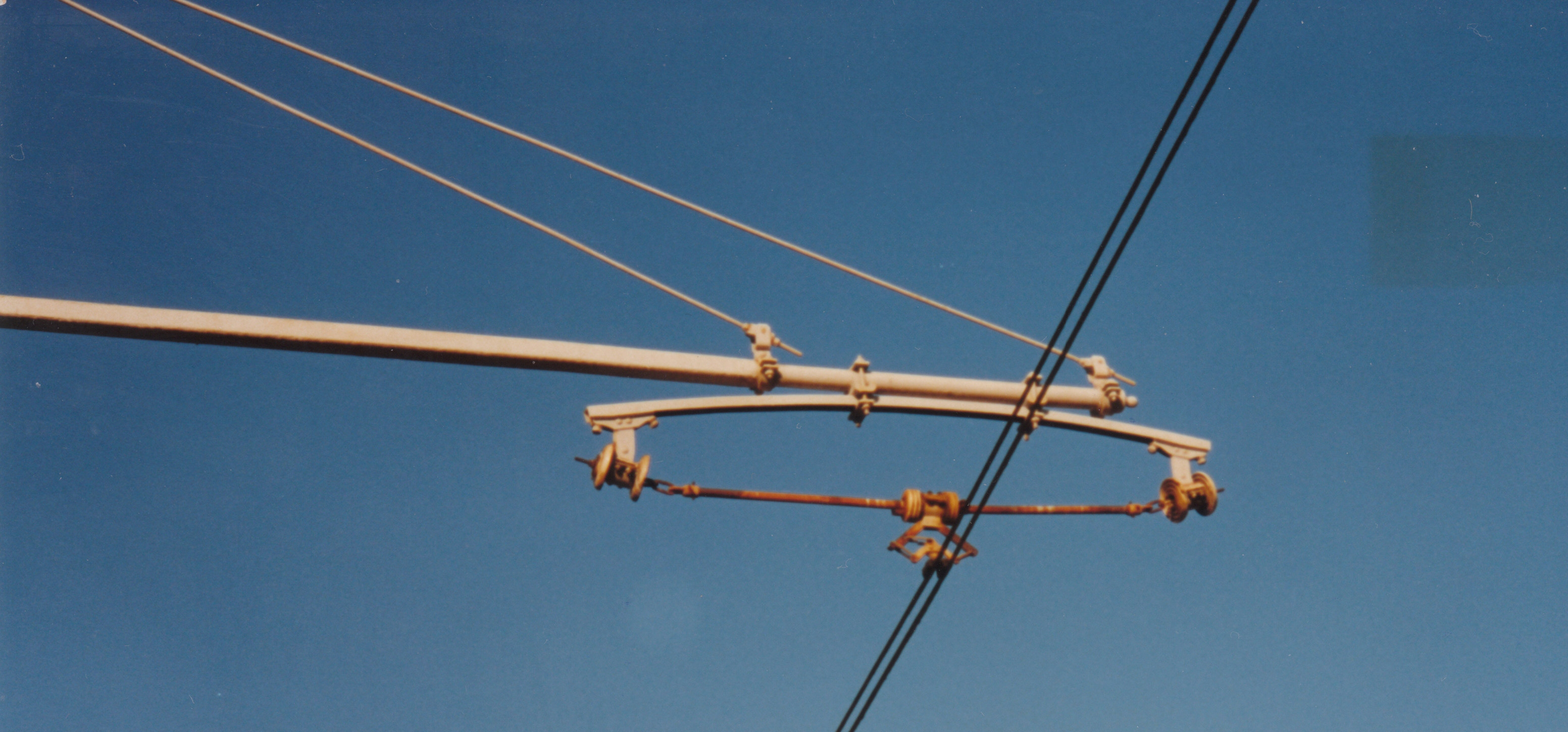 Autore: Andrea Ghiazzi Fonte: File cedutomi direttamente dall'autore Catenaria trifase della stazione di Taggia-Arma